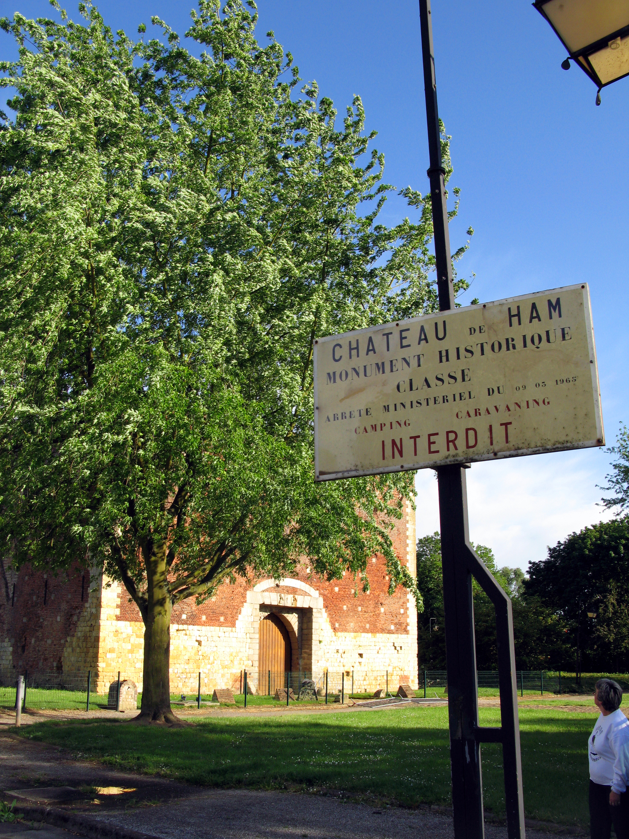 Ham (Somme, France) - Panneau à l'entrée du château.